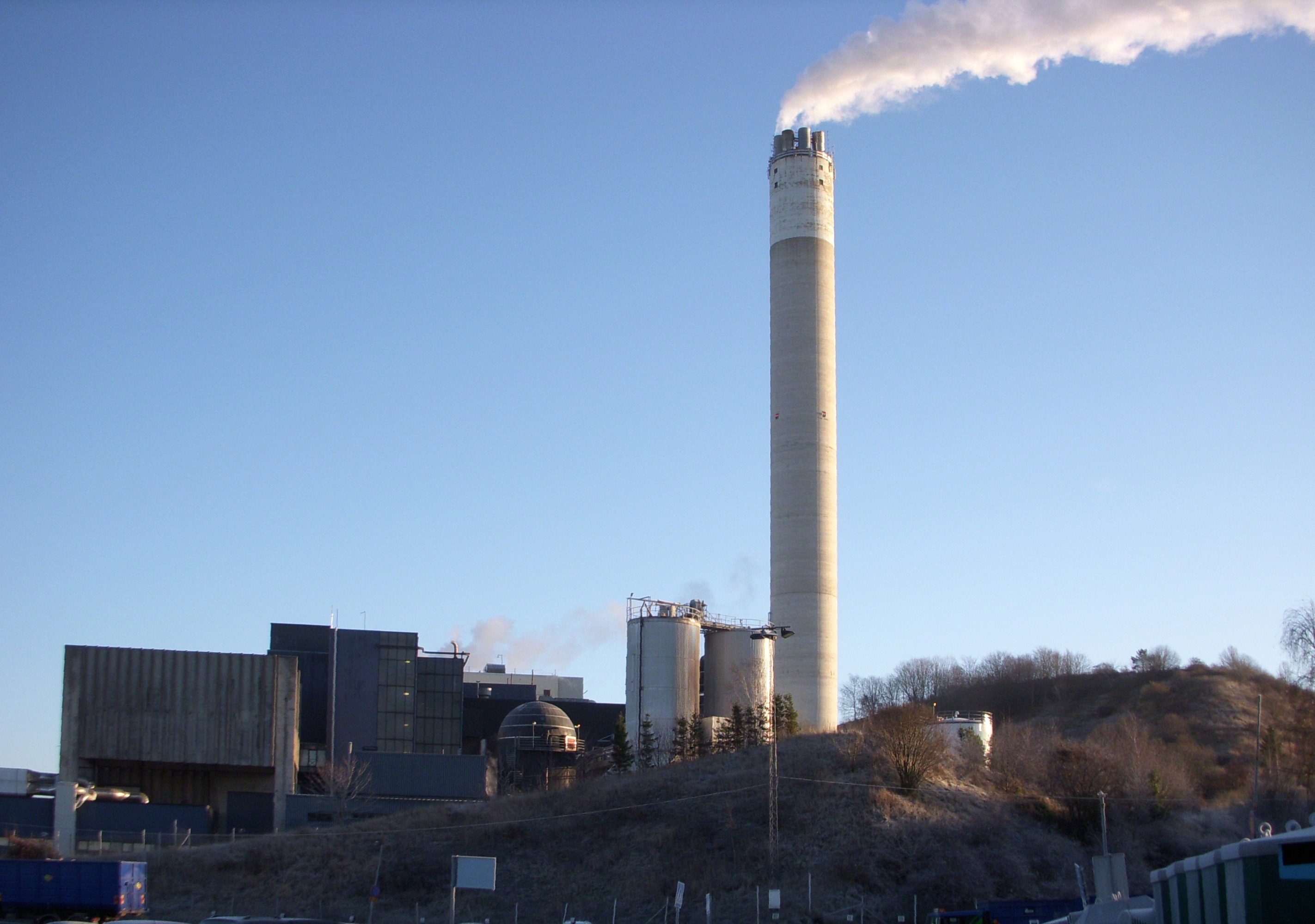 Högdalenverket i Högdalen, södra Stockholm